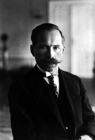 Antanas Smetona, erster Präsident der Republik Litauen. Veröffentlicht in Tempo, 29.09.1929, Fotografie von Robert Sennecke.[1]